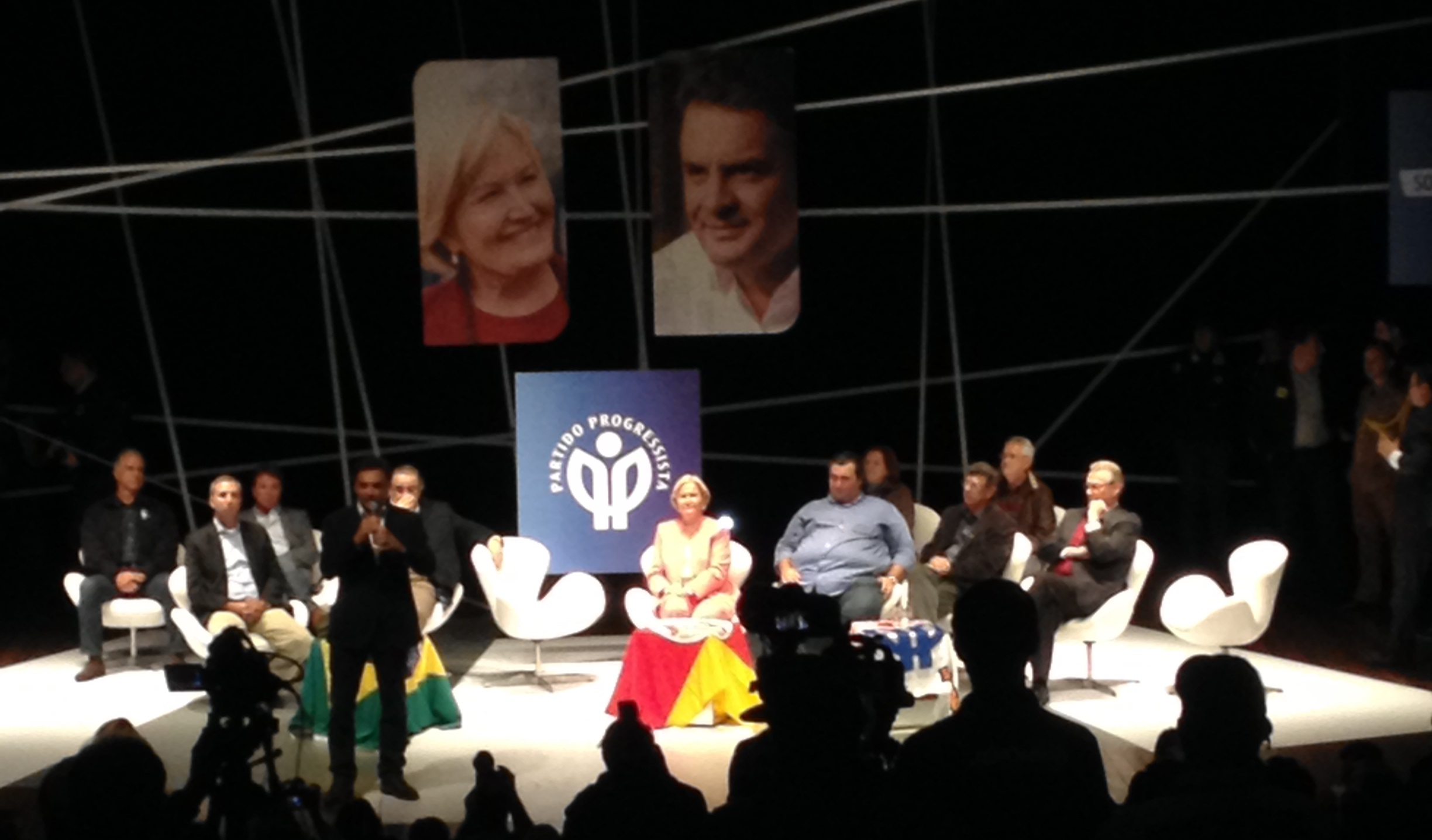 Pré-lançamento das candidaturas de Aécio Neves e Ana Amélia Lemos.